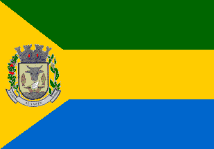 Bandeira do município de Autazes, Amazonas, Brasil.